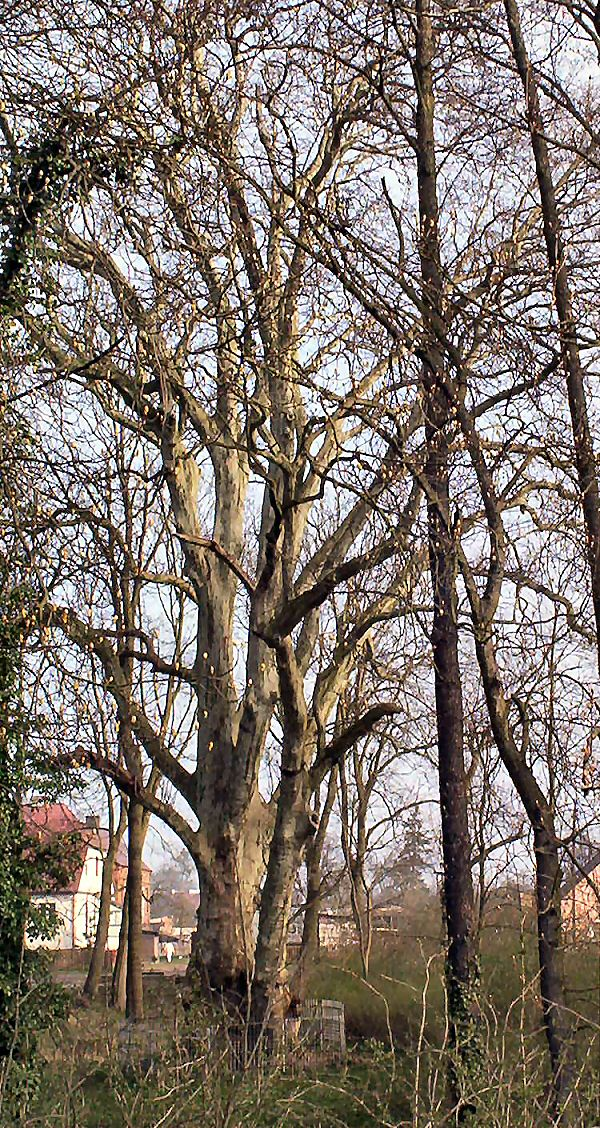 Chojna - Platan "Olbrzym"